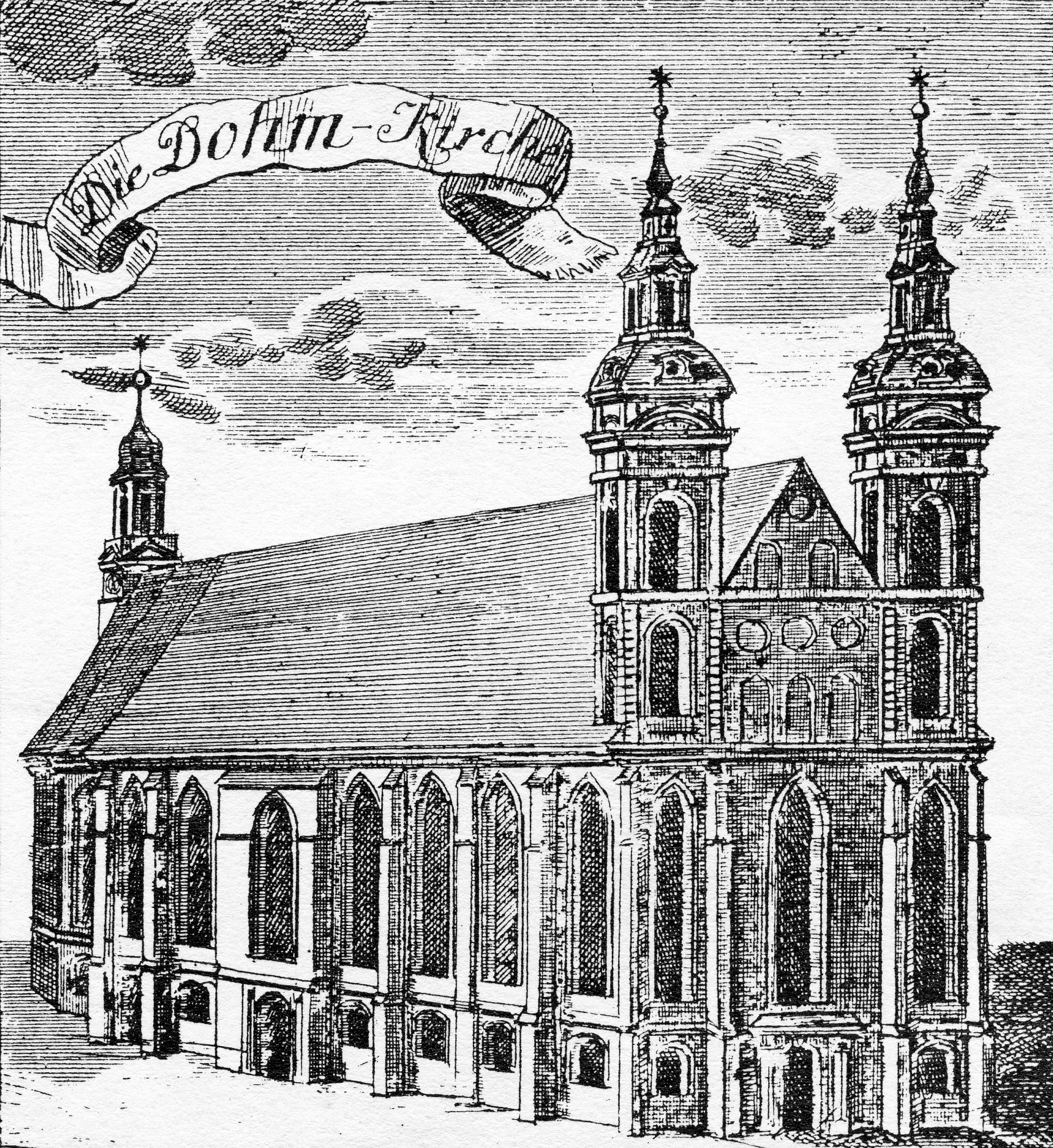 Die um 1345 erbaute Oberpfarrkirche der Hl. Dreifaltigkeit (umgangssprachlich die Domkirche, unter dem Namen Oberpfarrkirche 1608–1747, ab 1613 mit reformierten Bekenntnis; unter dem Namen Domkirche Unserer Lieben Frau, des Heiligen Kreuzes, der Hll. Peter, Paul, Erasmus und Nicolaus von 1536–1608, ab 1539 mit lutherischem Bekenntnis; vor 1536 unter dem Namen Sankt Paulikirche, eine Klosterkirche der Dominikaner). Der südlich des Schlosses gelegene Bau wurde 1747 abgetragen zu Gunsten des Schlossausbaus, ein Neubau folgte nördlich des Schlosses.